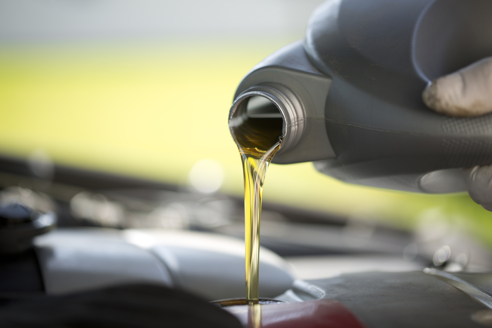 SIGAUS Used industrial oil recycling